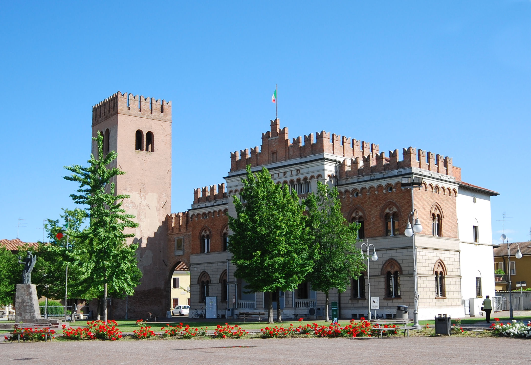 Marmirolo, torre civica e municipio.